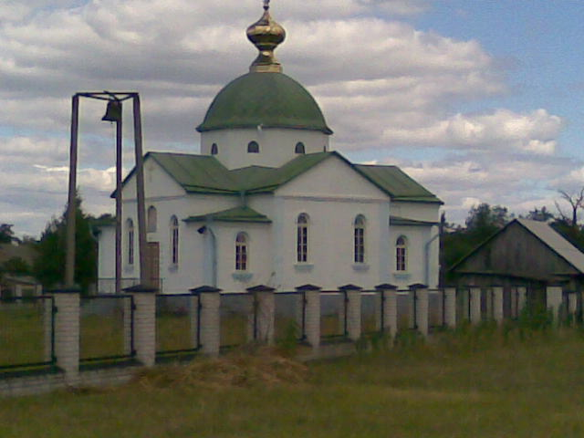 Зображення церкви у Воропаєві (Київ. обл.)